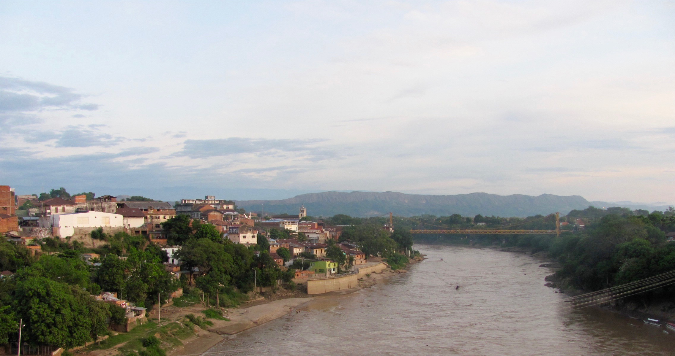 Esta fotografía fue tomada en el municipio colombiano con código 25307.